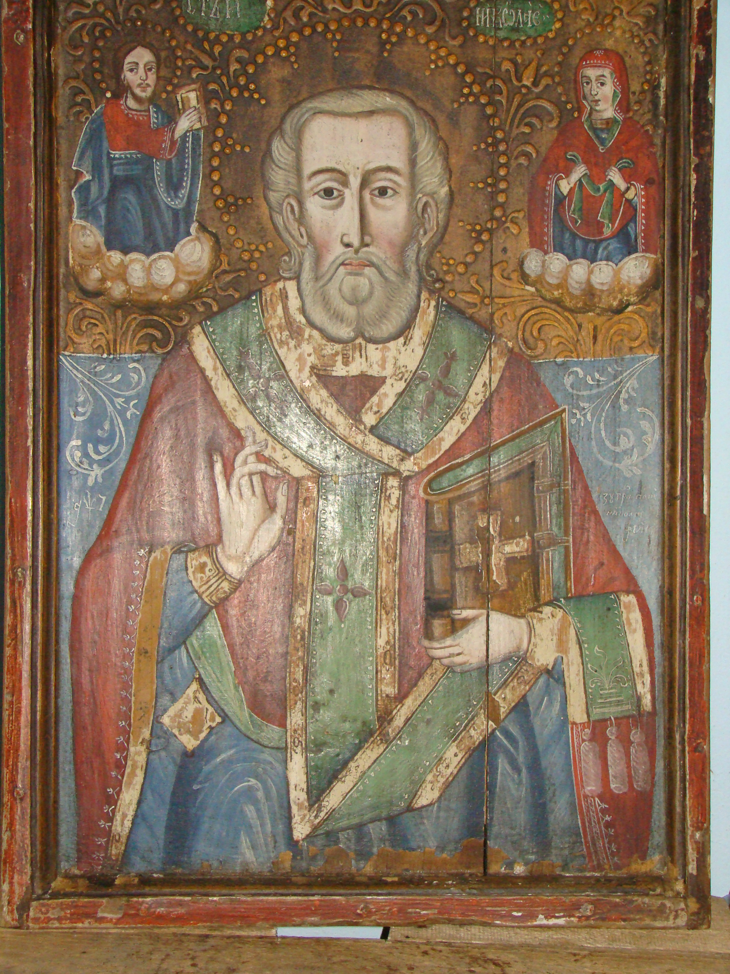 Biserica de lemn Sf.Nicolae Cuștelnic-interioare